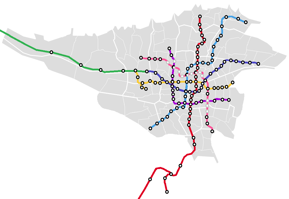 نقشه جغرافیایی مترو تهران و مناطق شهرداری تهران